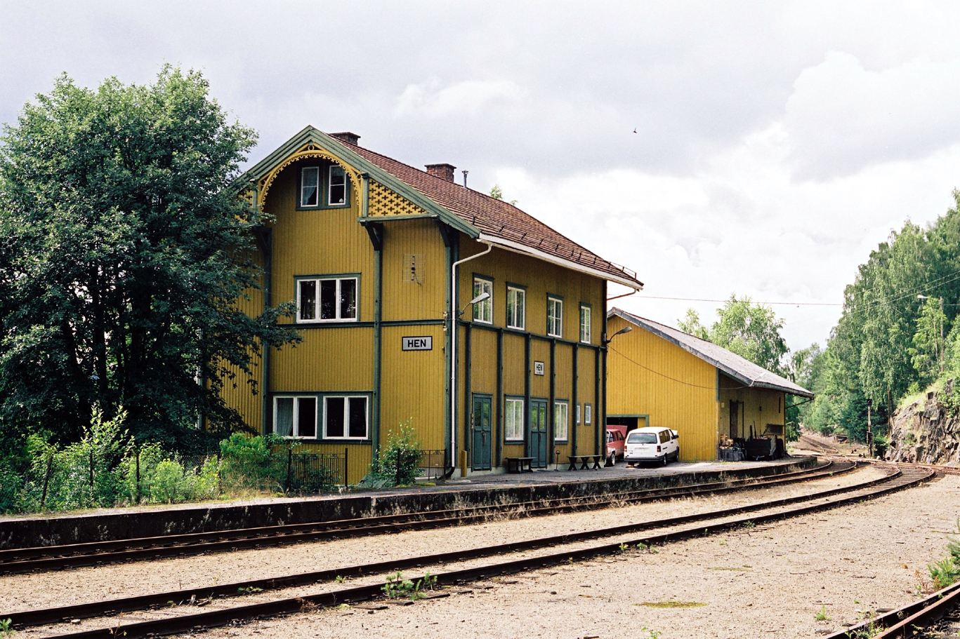 Hen stasjon, Randsfjordbanen. Bygd 1867; architect Georg Andreas Bull. Påbygd til to fulle etasjer 1909.